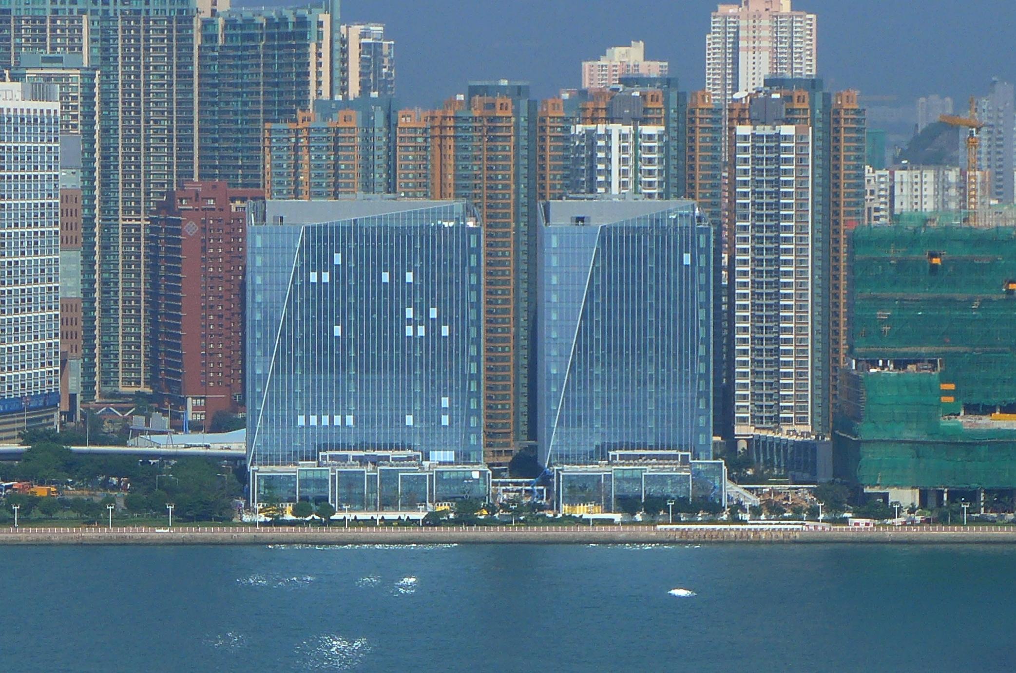 One HarbourGate Site